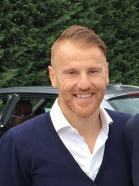 Michele Marcolini, allenatore e calciatore italiano